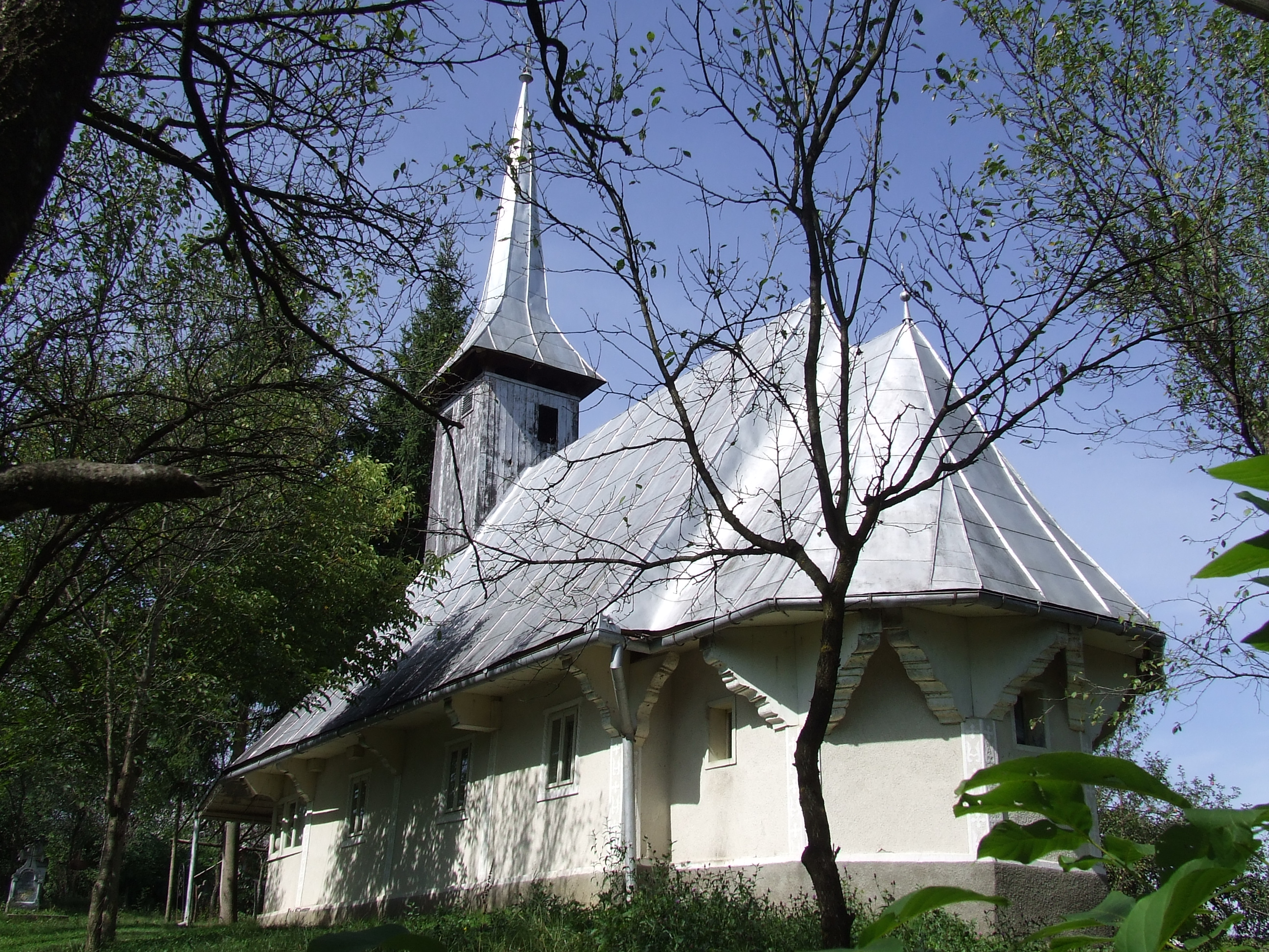 Biserica de lemn din Zalha, judeţul Sălaj. Autor: Bogdan Ilieş Data: septembrie 2007